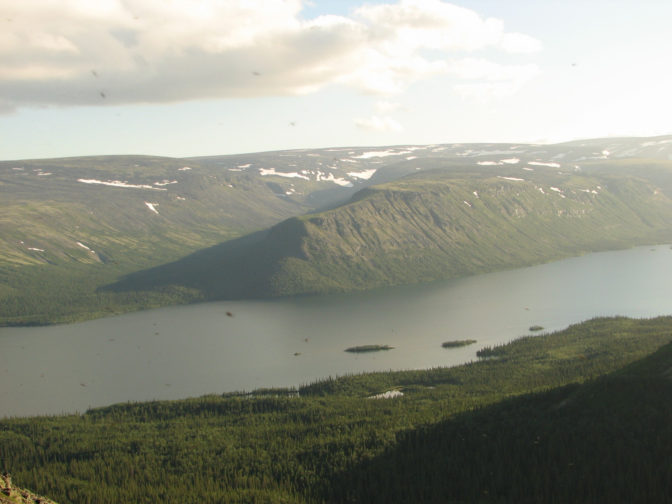 Вид на Сейдозеро с г. Куйвчорр